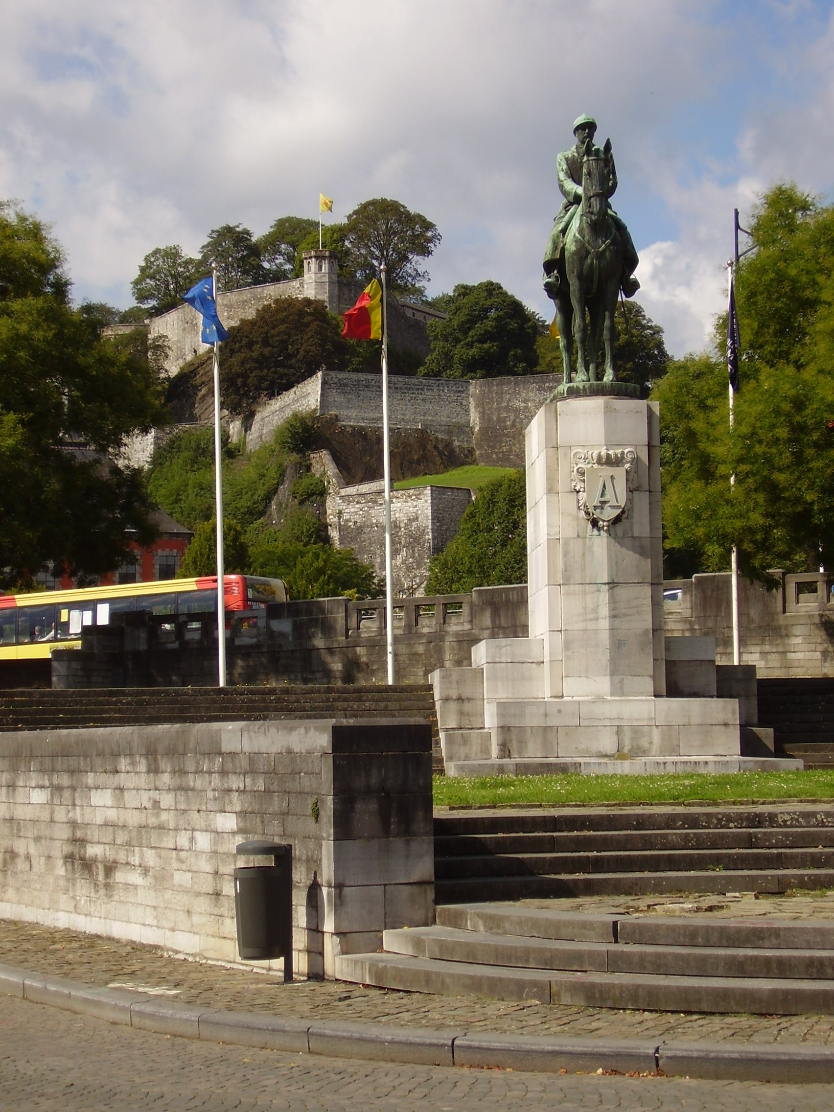 Statue du roi Albert I, au confluent de la Sambre et Meuse, Namur (city), Belgium